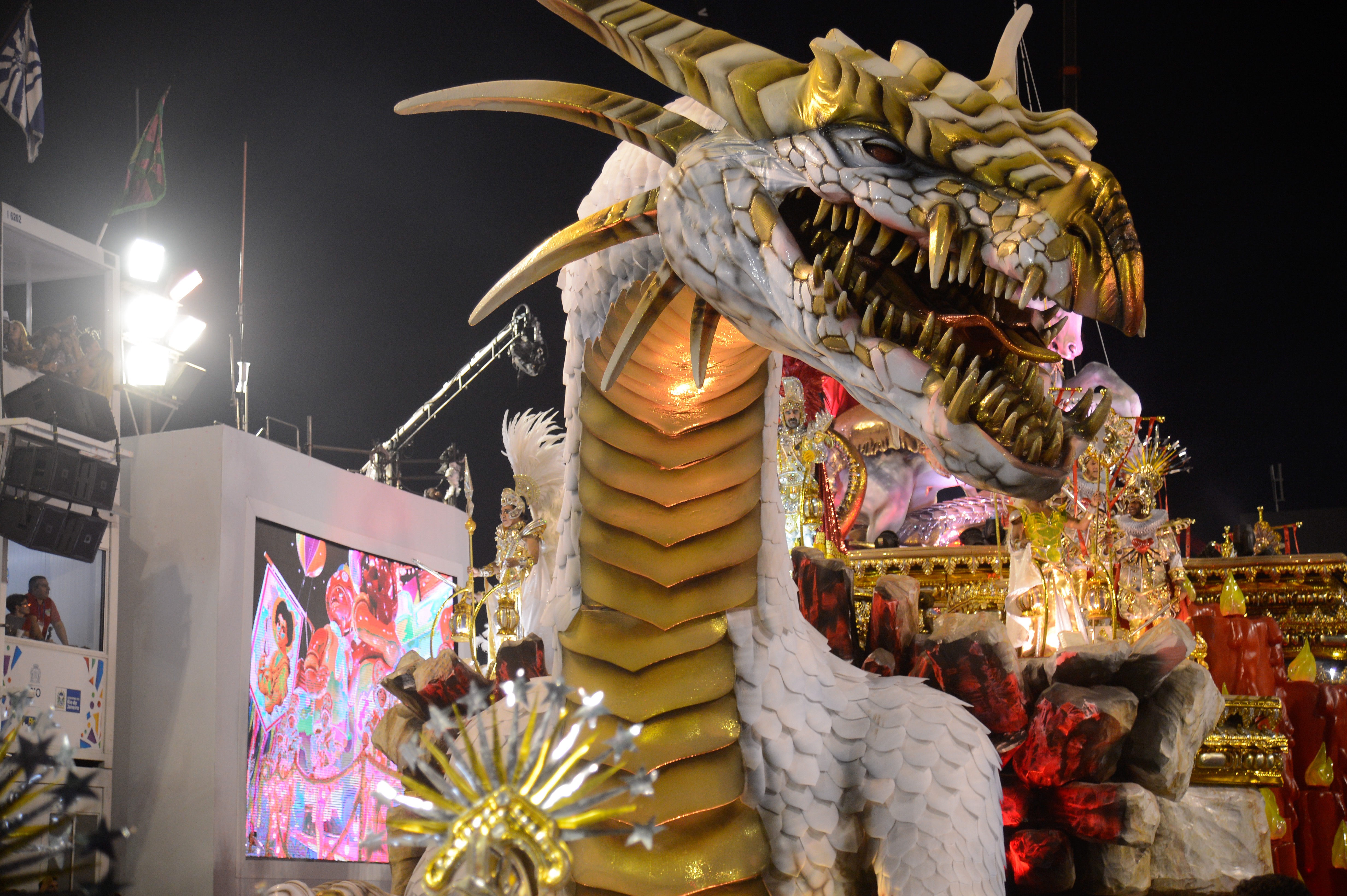 Rio de Janeiro - Desfile da escola de samba Mangueira, pelo grupo especial, no Sambódromo (Fernando Frazão/Agência Brasil)